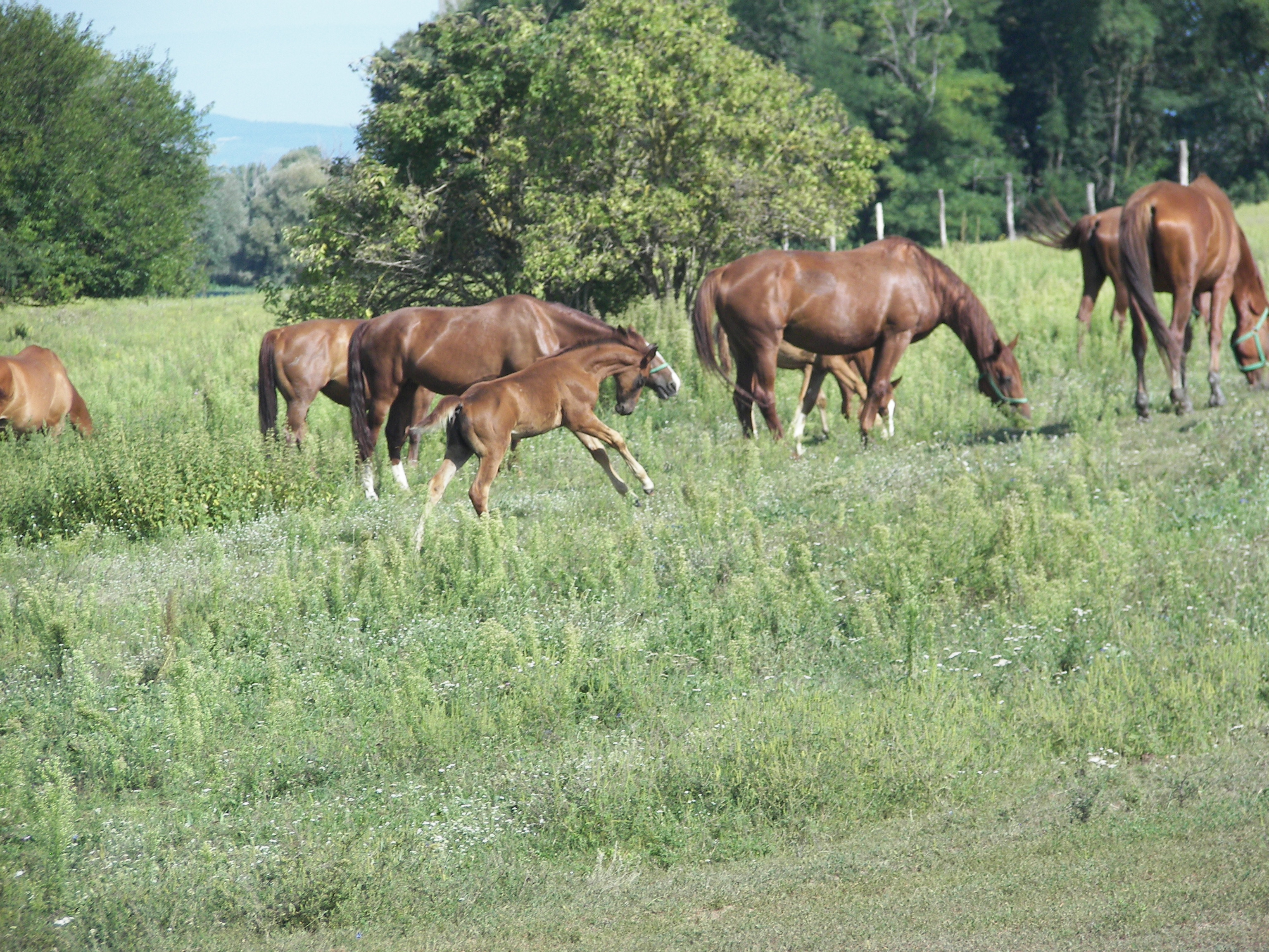 Gidranfohlen